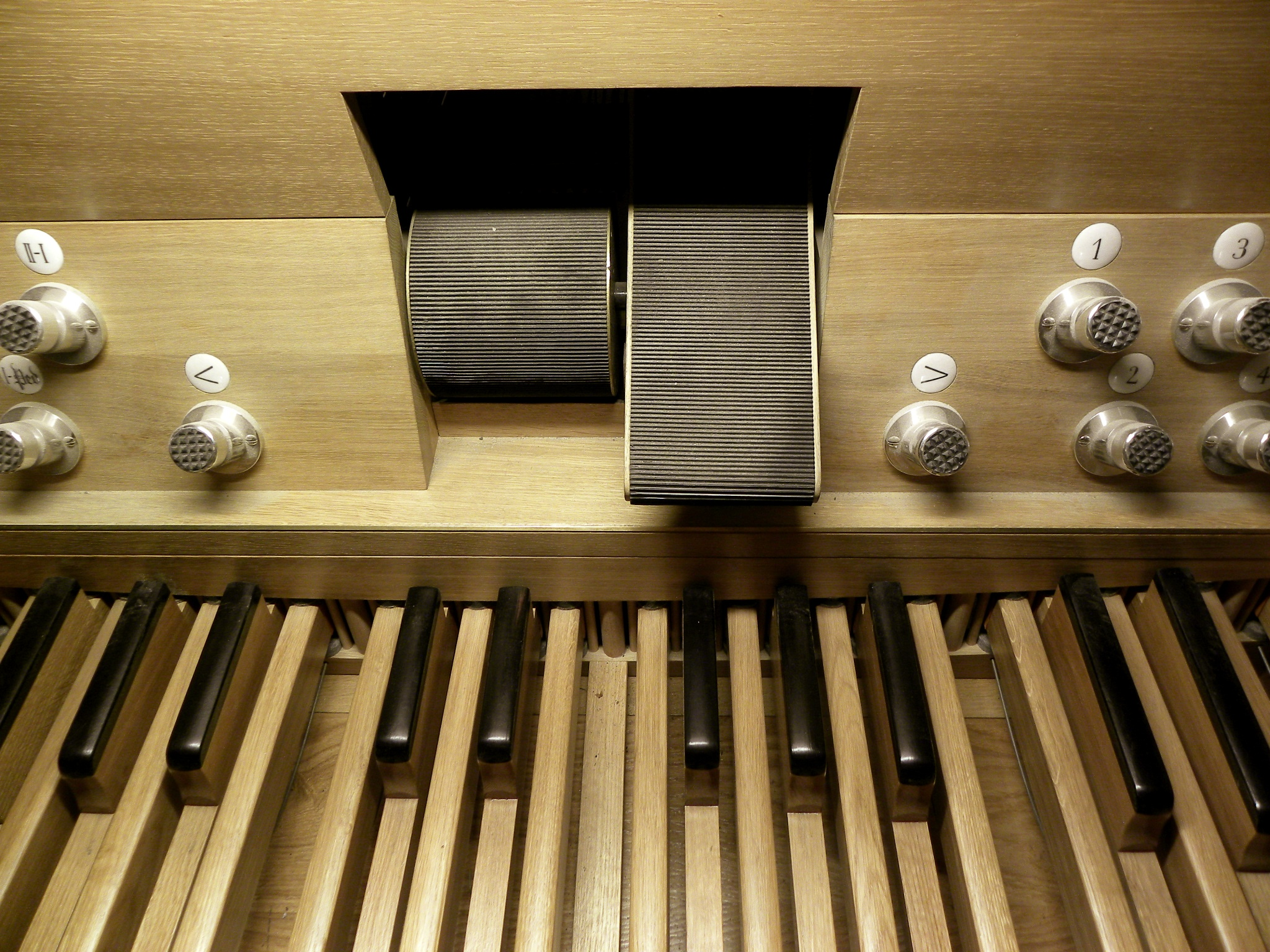 Walze (Crescendotritt) und Schwelltritt